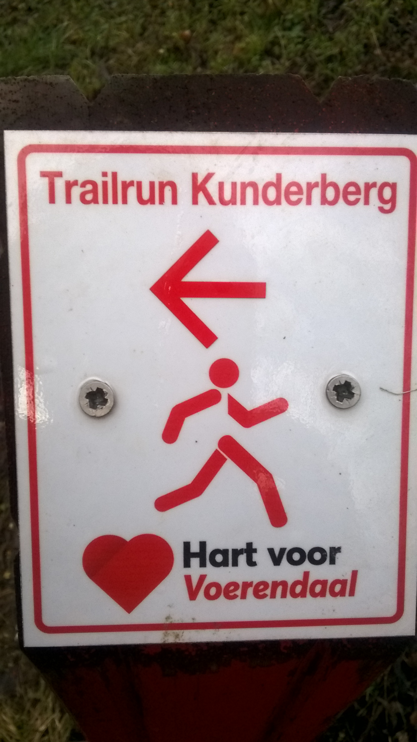 Bordje van de hardlooproute Kunderberg. Hoek Kunderberg en Sillenweg.